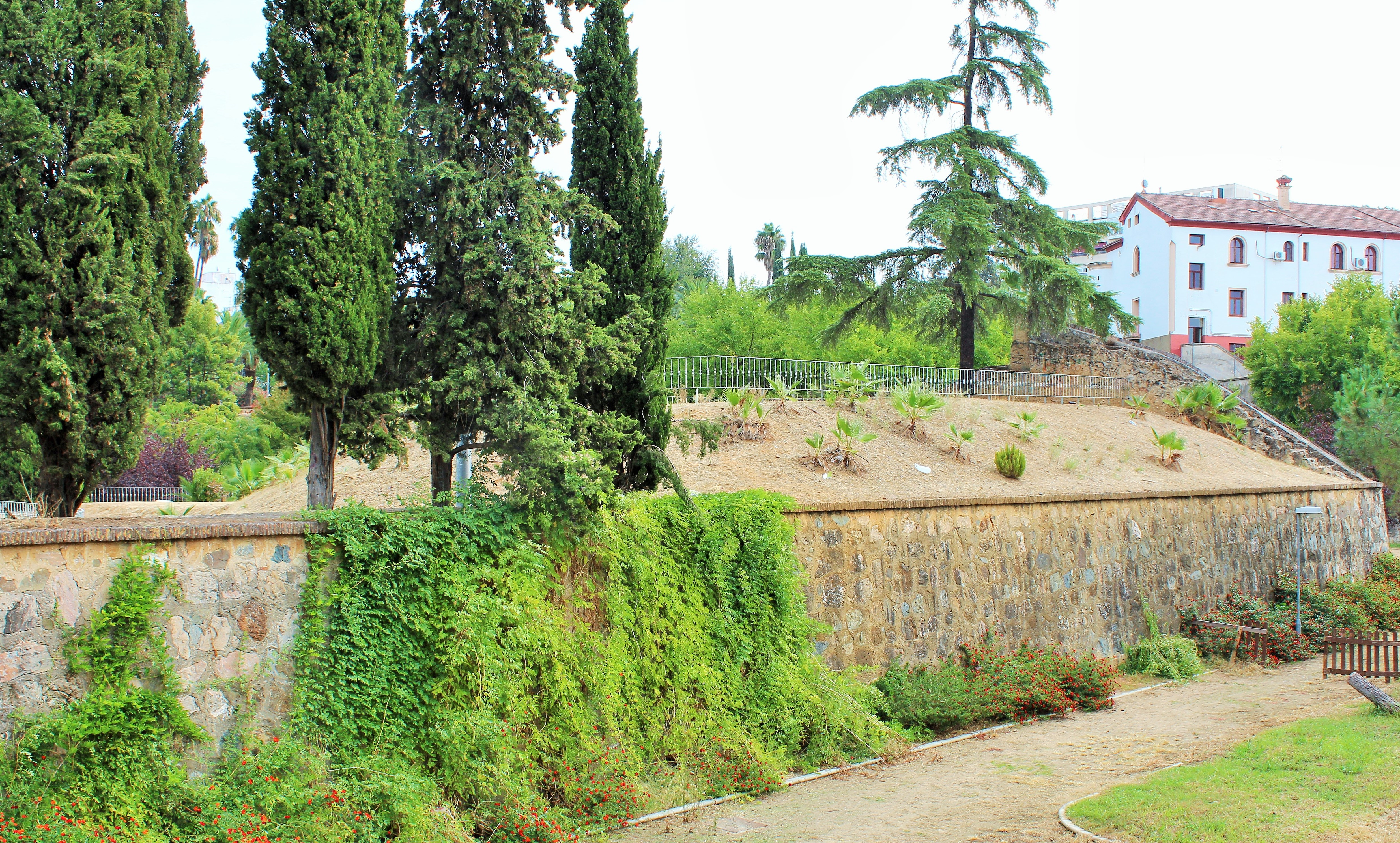 Lateral occidental del revellín.